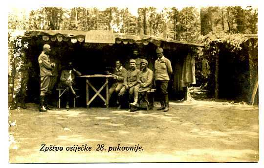 28. domobranska pukovnija, bojište, 1. svj. rat